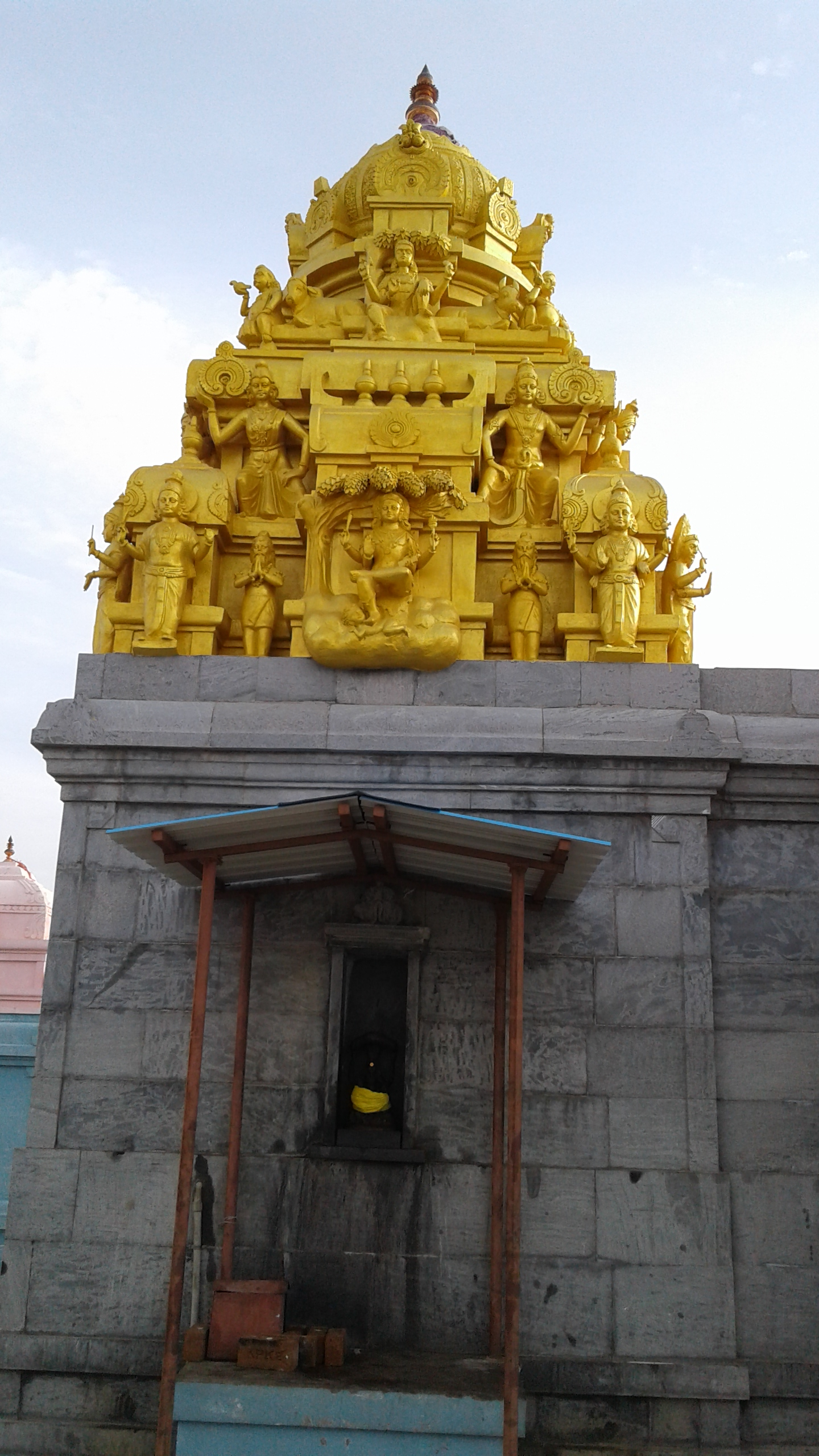 நந்தமேடு வீரபாண்டீசுவரர் கோயிலின் தட்சணாமூர்த்தி